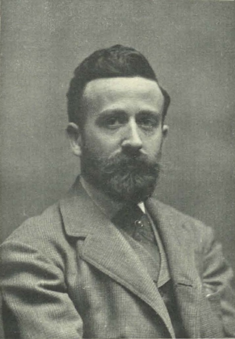 Fotografía de Félix Mestres Borrell realizada por Pablo Audouard